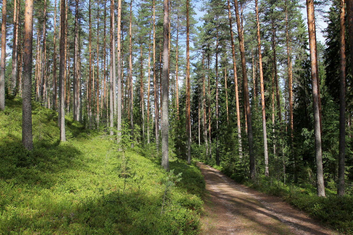 Kapeenkosken Luijanharju Äänekoskella